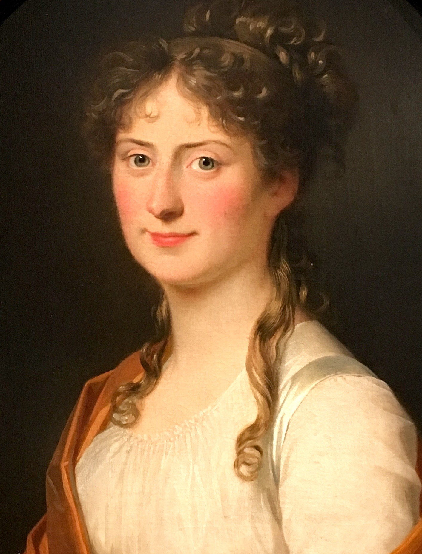 Sophie Elisabeth Chrystie, født Krefting (1774-1868), detalje fra maleri af Jens Juel, Nasjonalgalleriet, Oslo